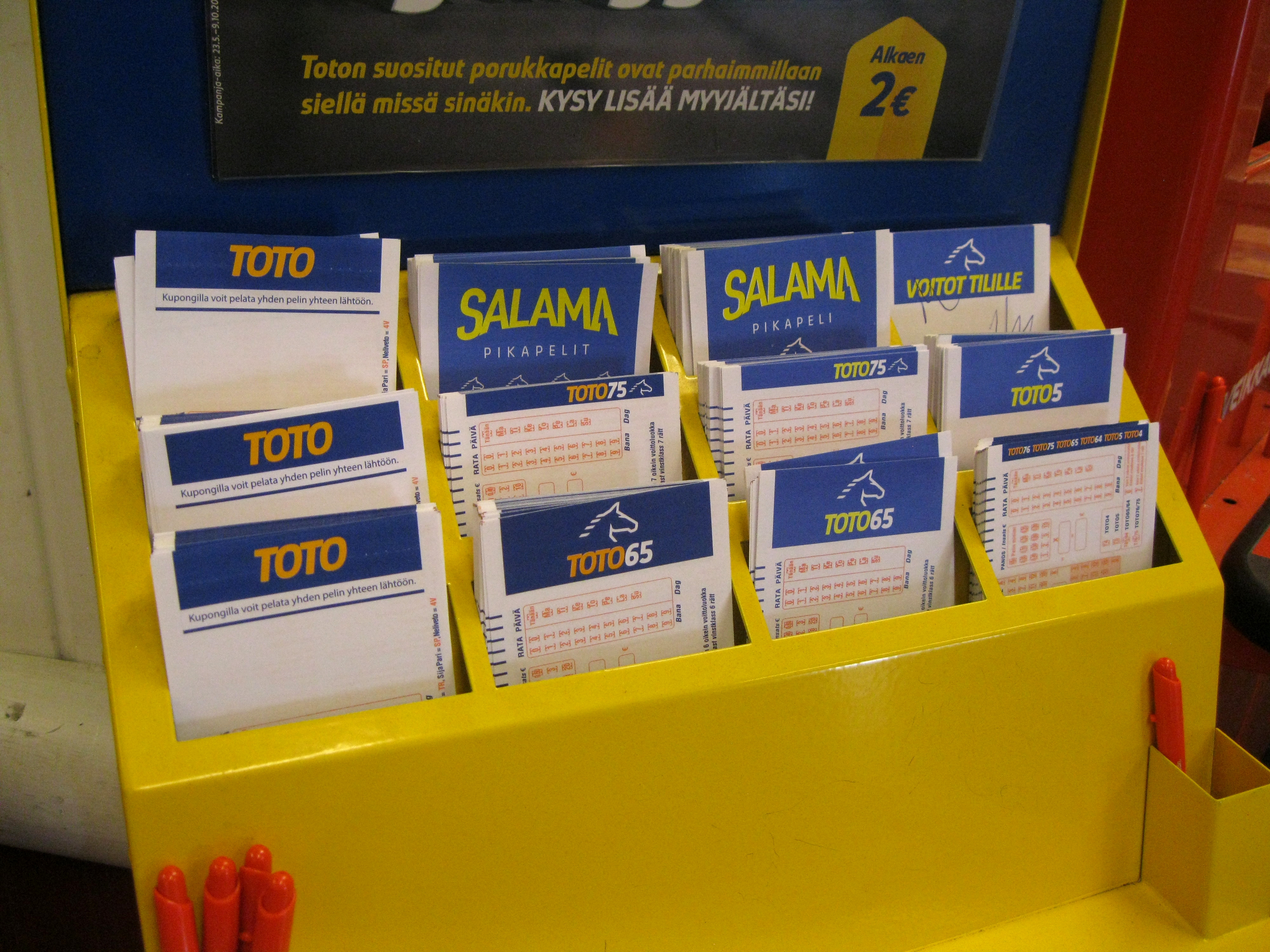 Fintoto pelikuponkeja.